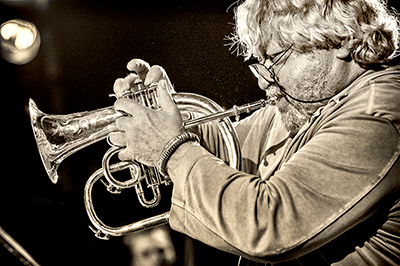 Herbert Joos, Photo by Frank Schindelbeck